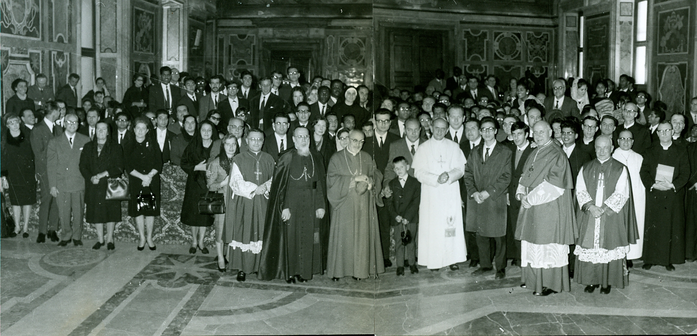 14 ottobre 1965 - Udienza Papa Paolo VI Foto di gruppo